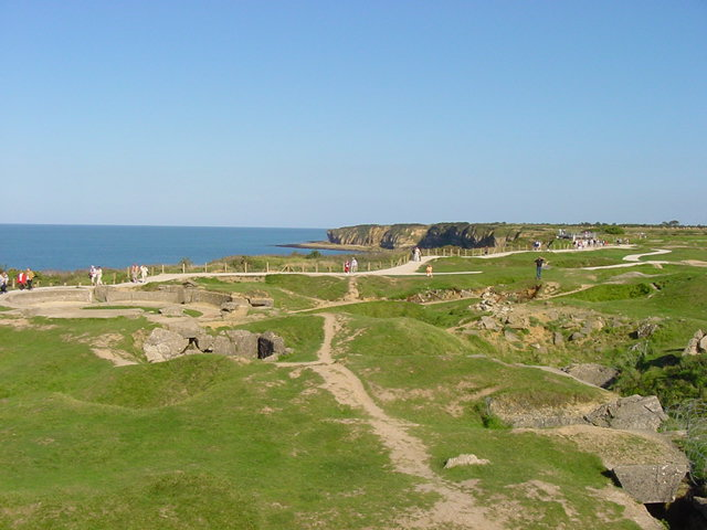 La Pointe du Hoc, important lieu de la Bataille de Normandie. Traces de cratères à cause des bombardements.